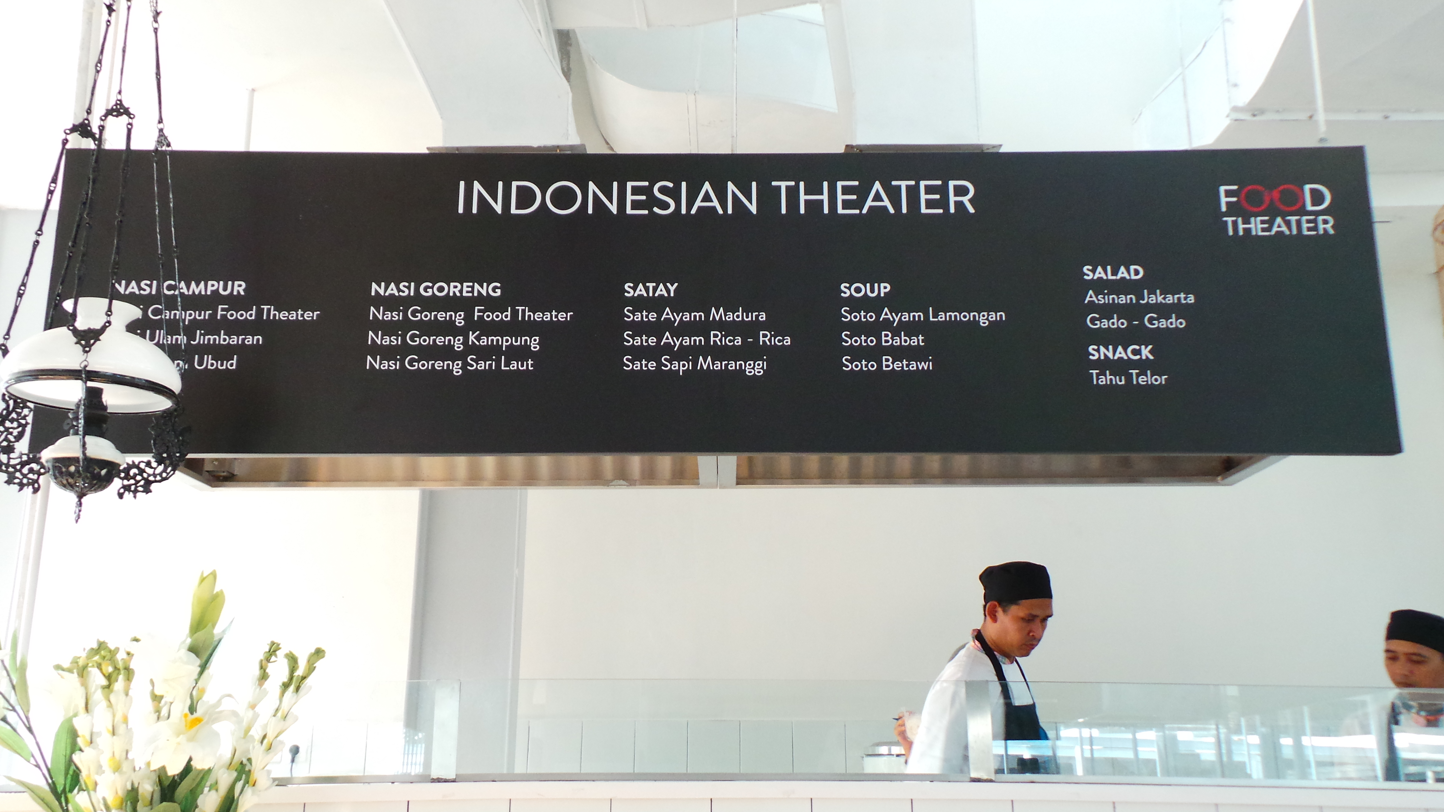 Food Theater